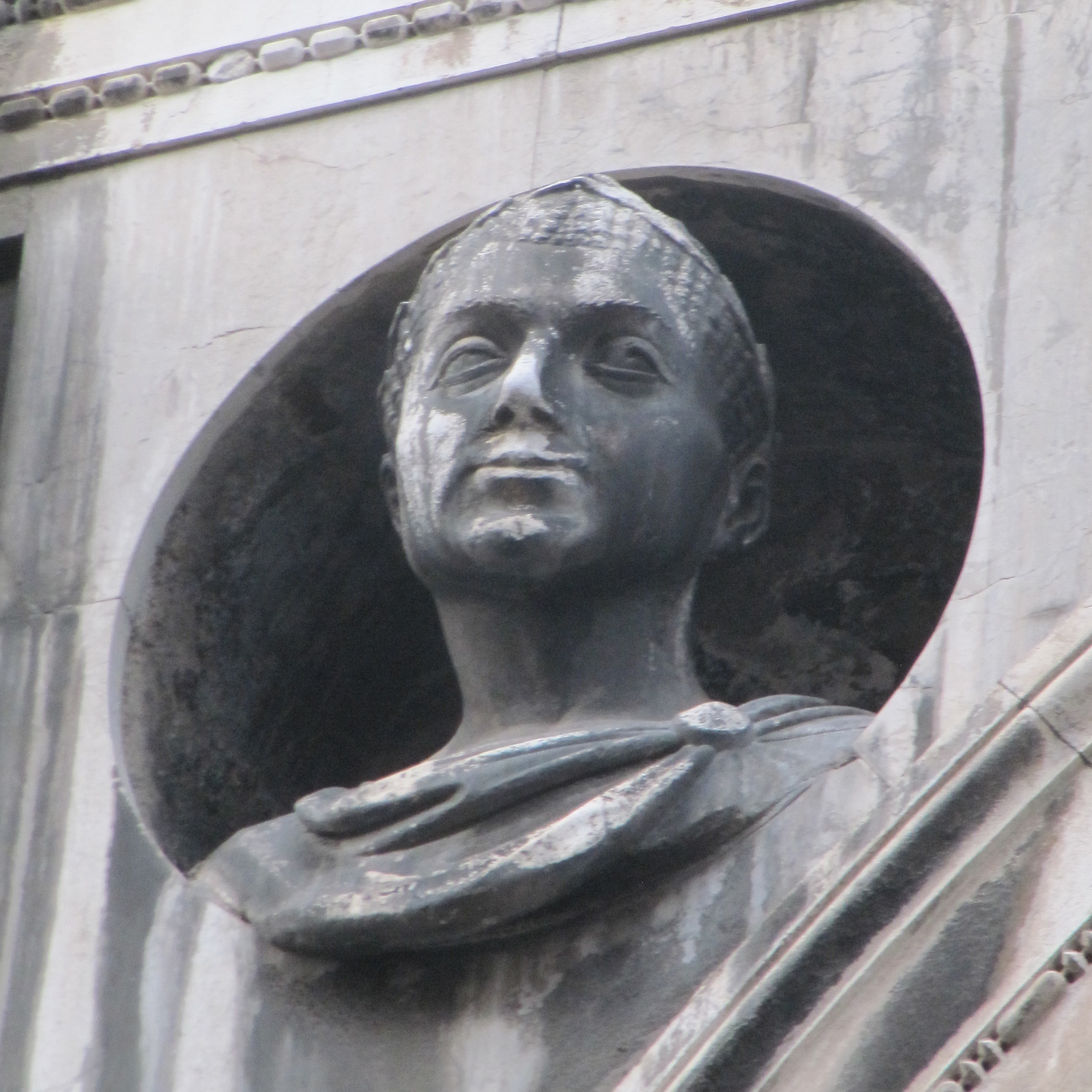 Busto di Cesare - Antonio della Porta (Palazzo della Loggia, Brescia)